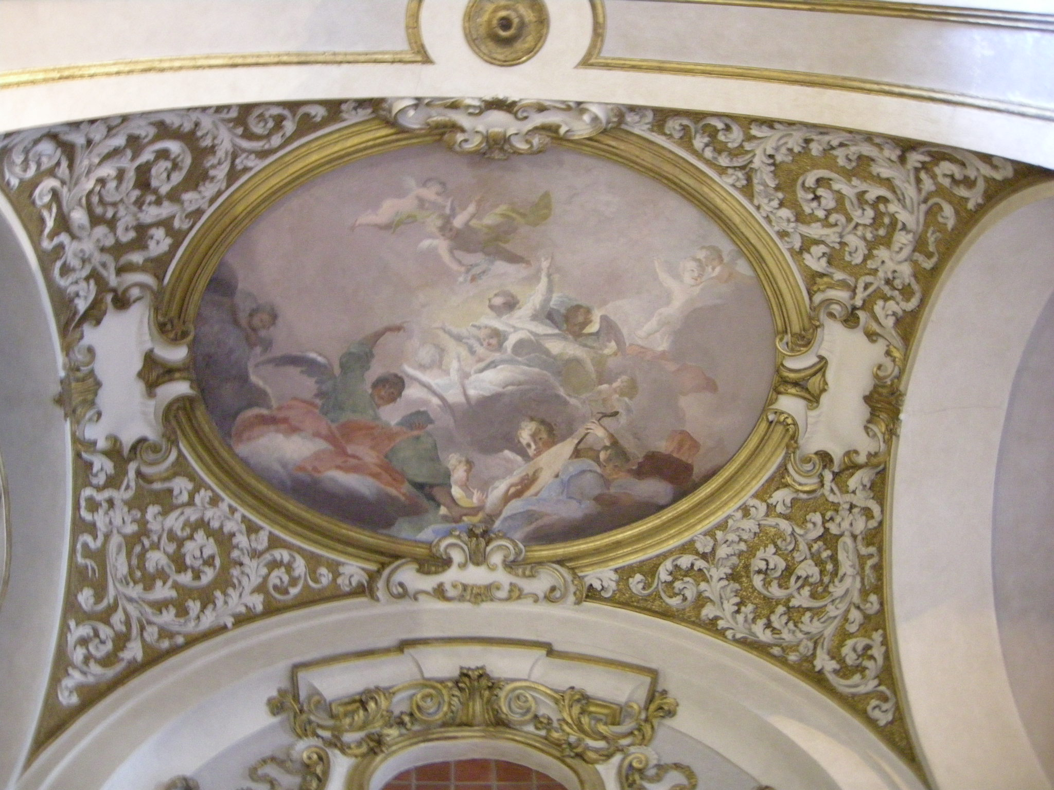 San Jacopo Soprarno, interno, altare sx 1 matteo bonechi angeli musicanti